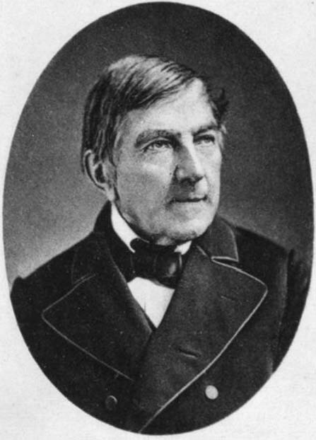 Porträtfotografie von Gustav von Duvernoy.